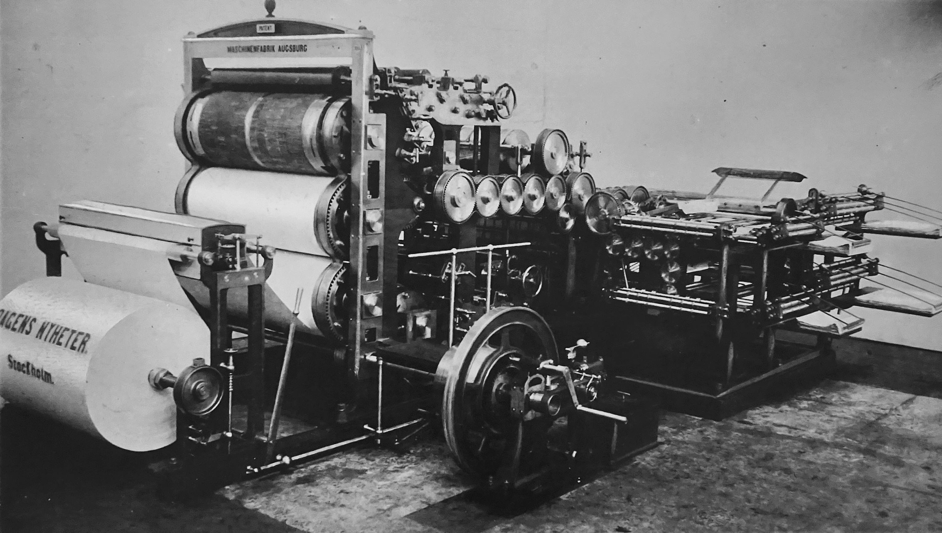 DN:s MAN tryckpress